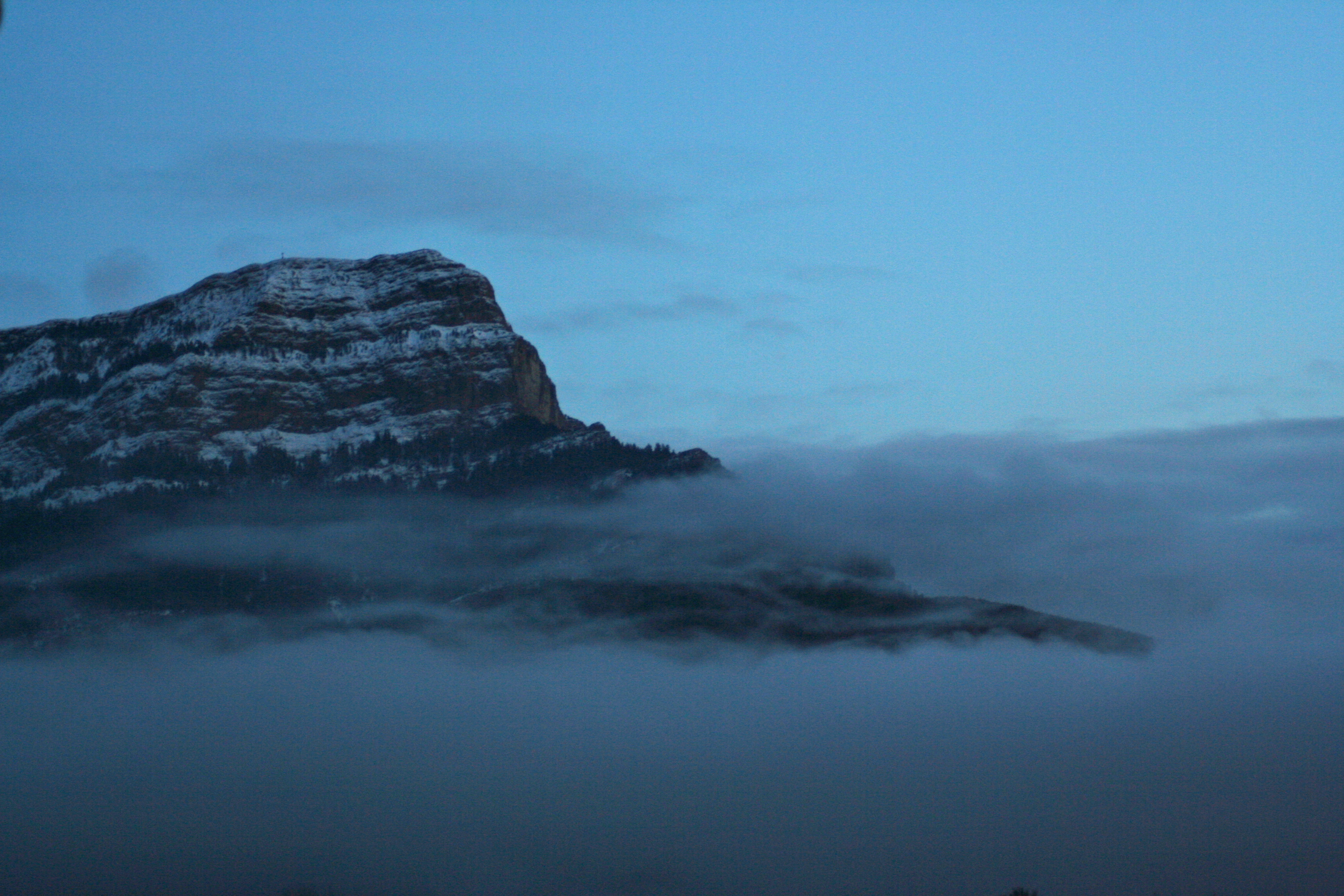 Penya Uruel or Peña Oroel, a mountain range in NW Aragon